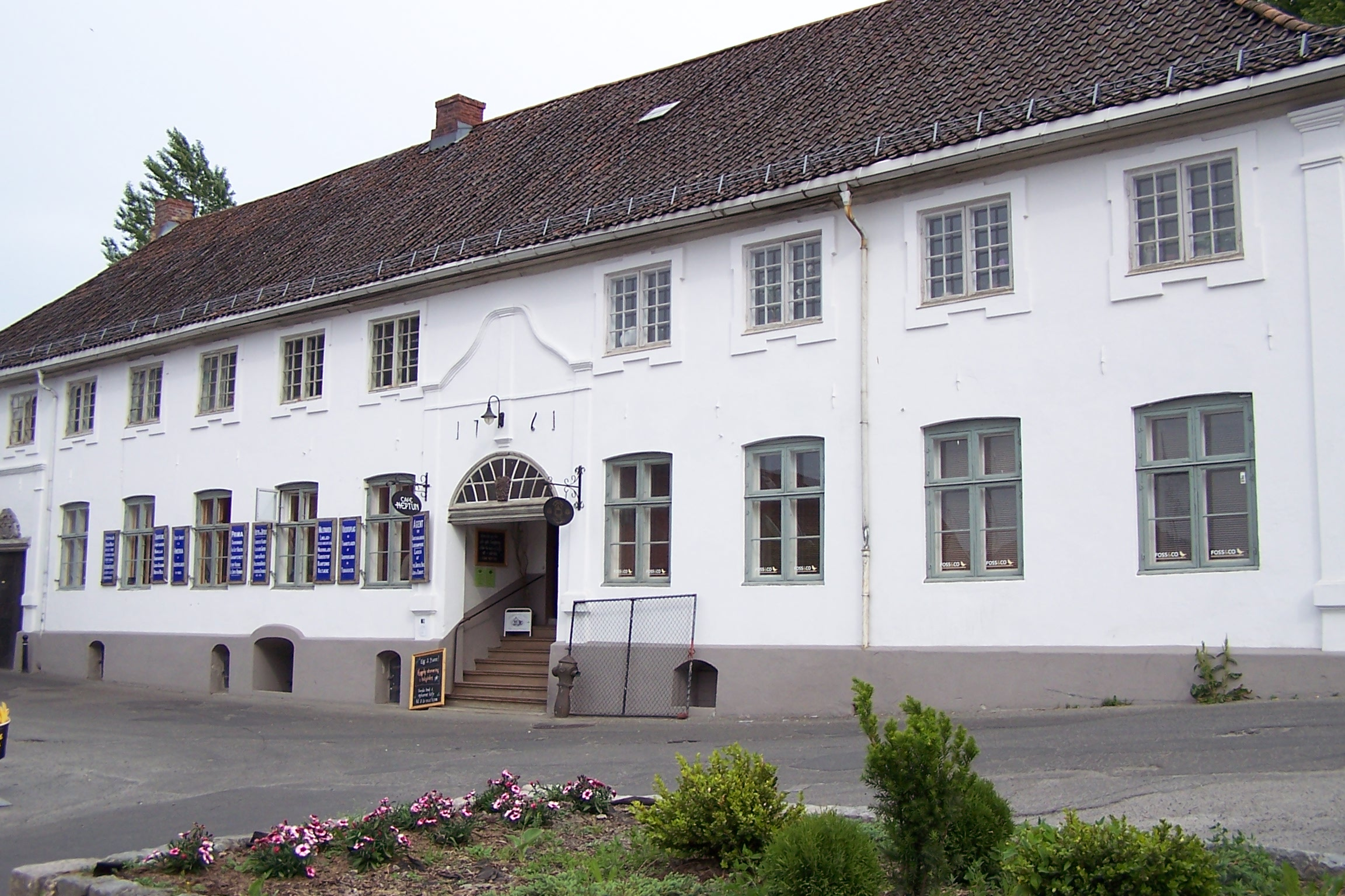 Son, Norway: Thornegården